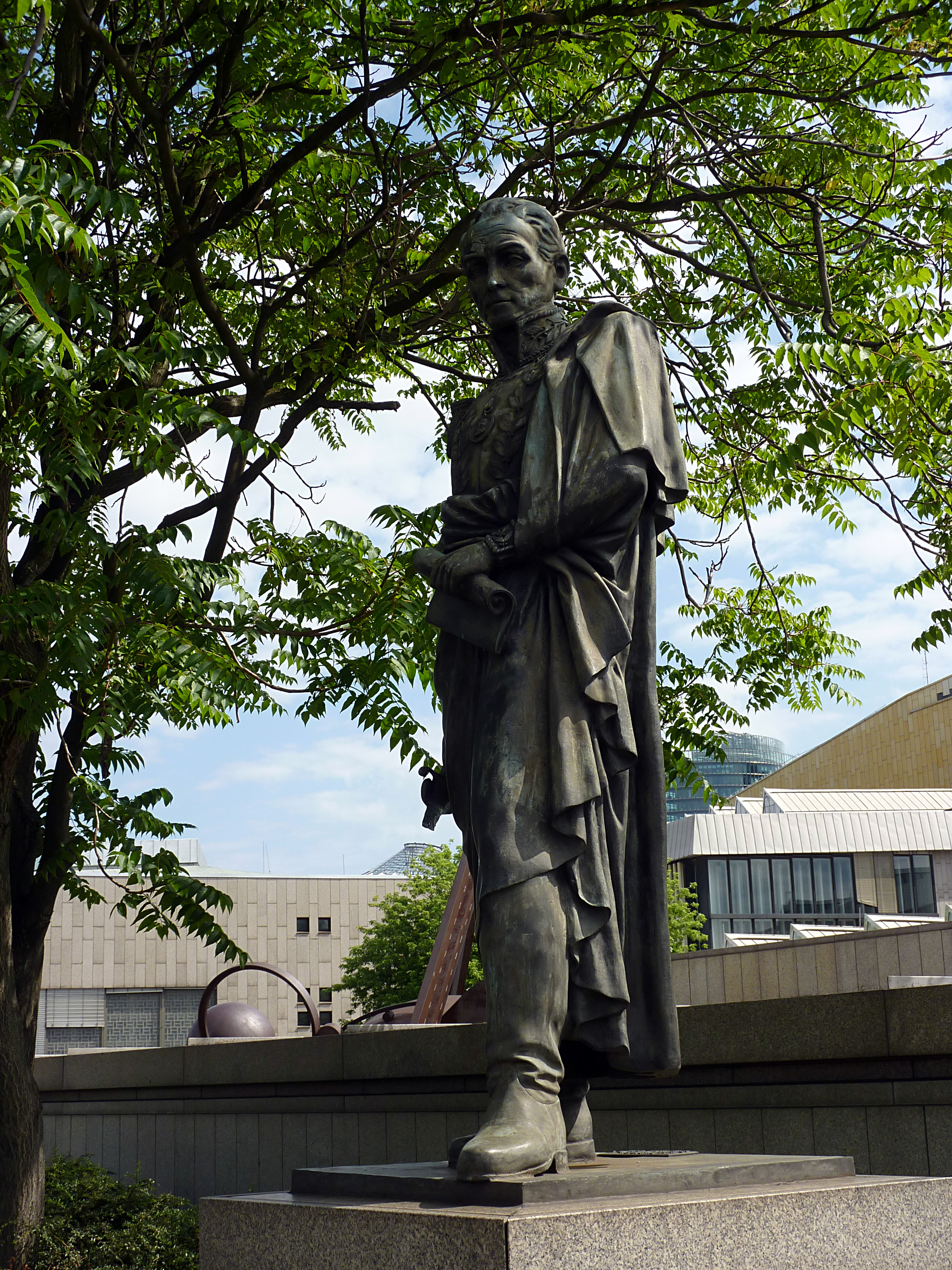 Simón Bolivar Statue vor dem Ibero-Amerikanischen Institut in Berlin.